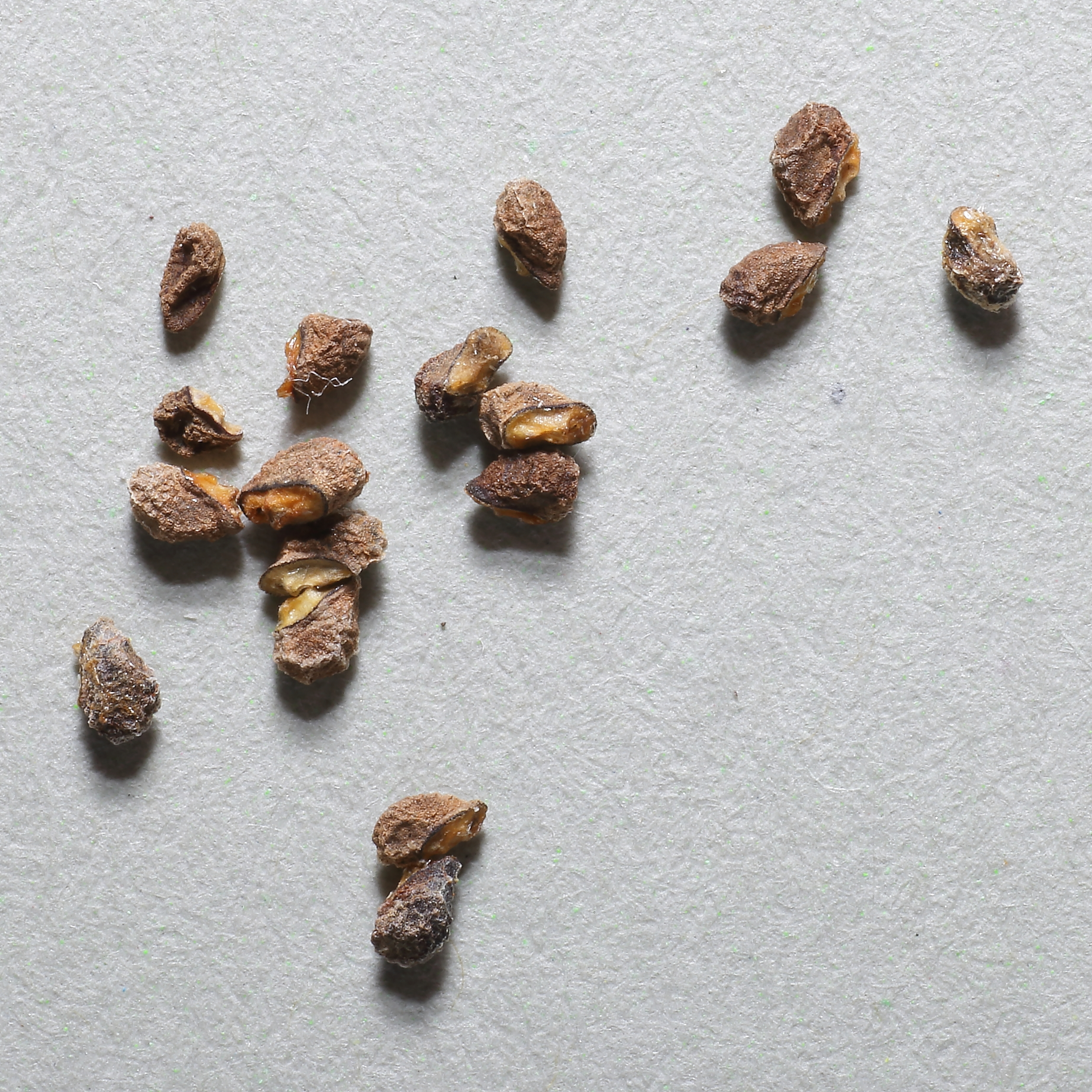 Frön från Neowerdermannia vorwerkii.